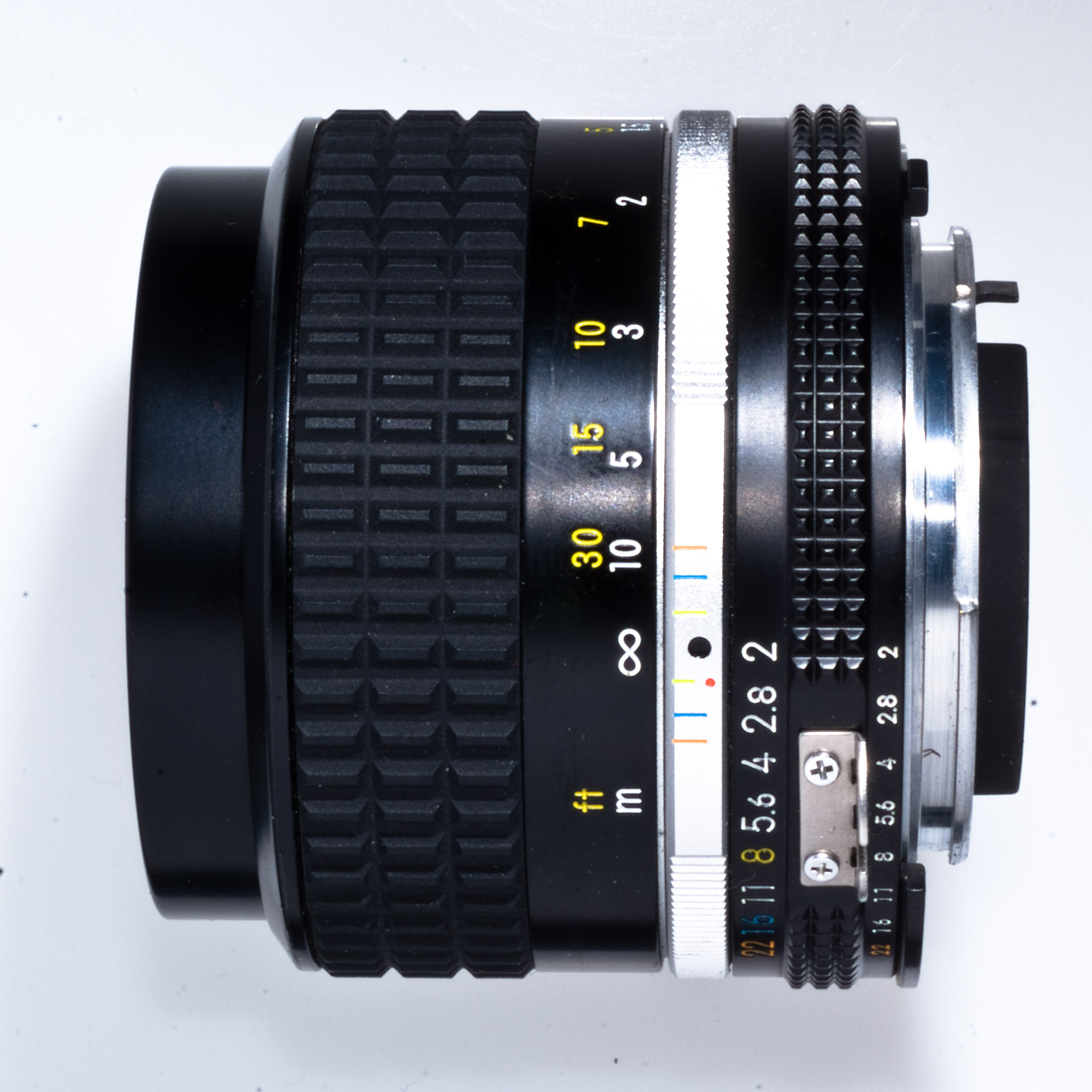 AiS Nikkor 85mm/2.0 lens by Nikon.